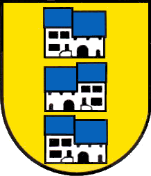 Wappen der politischen Gemeinde Liedertswil, Schweiz